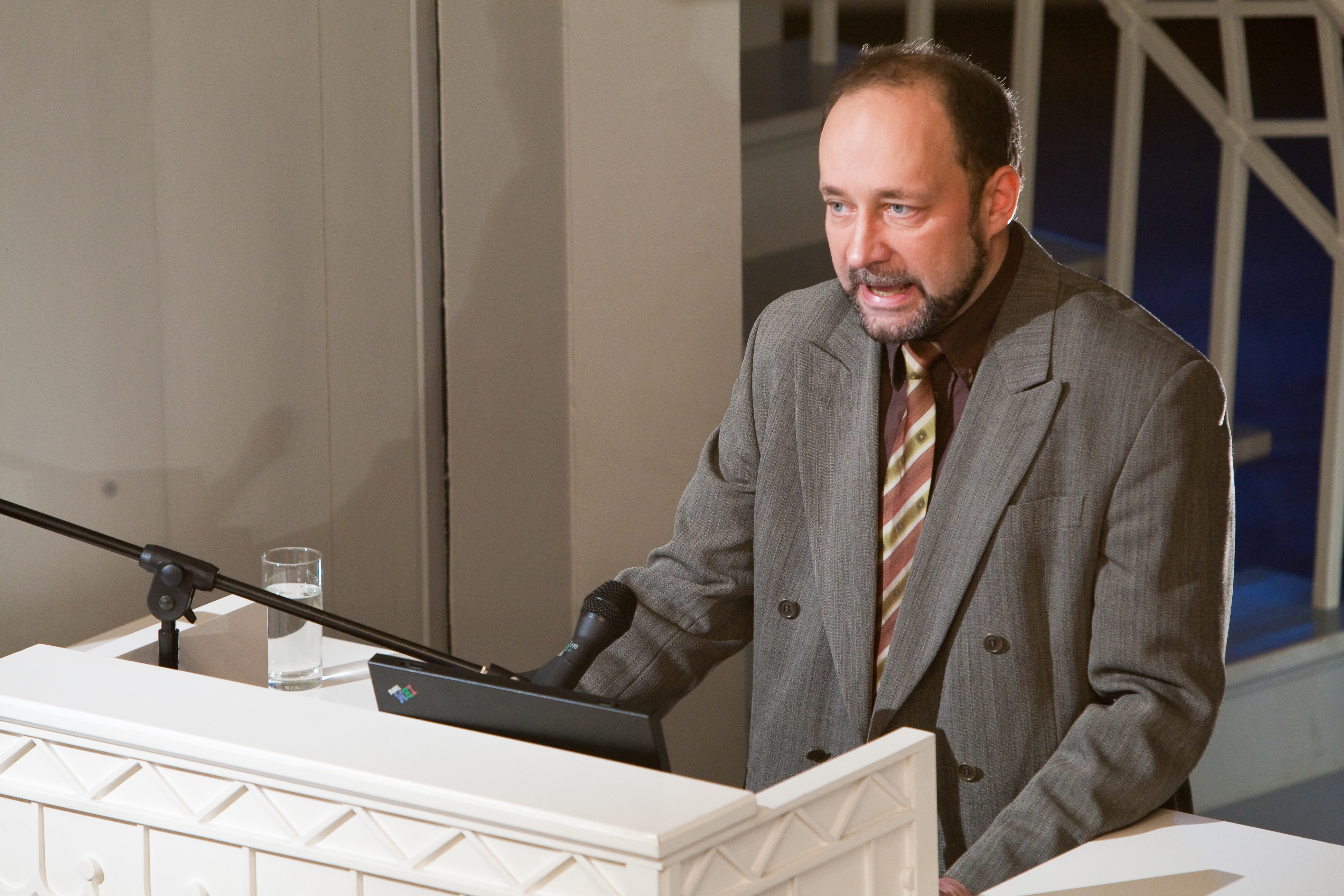 Rahvusülikooli 90. aastapäeva tähistamine. Konverents „Eestikeelne ülikool” Tartu Ülikooli aulas 3. detsembril 2009. Esineb Tartu Ülikooli professor Toomas Tammaru ettekandega "Loodusuurijana eesti keelest".